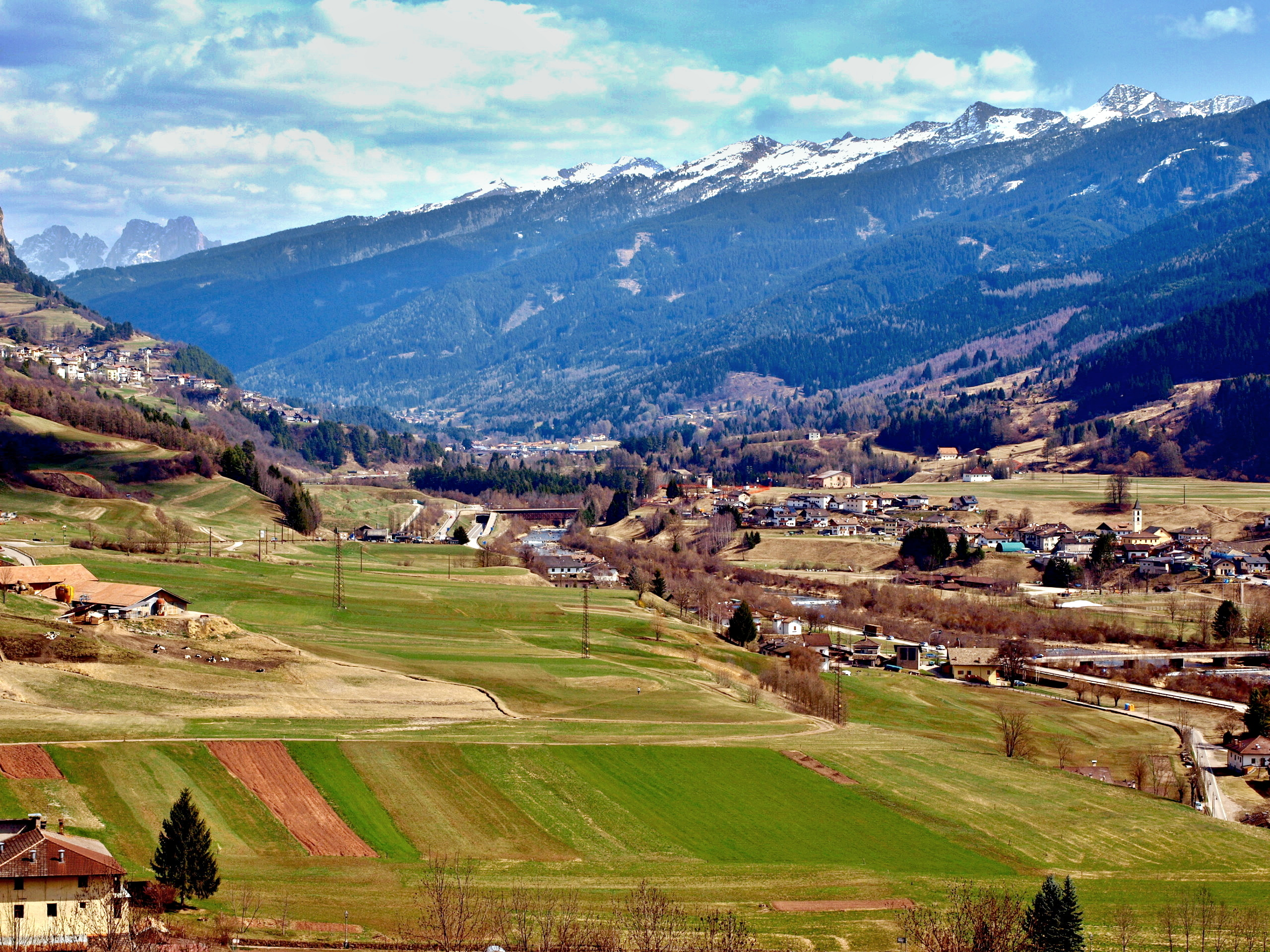 Cavalese